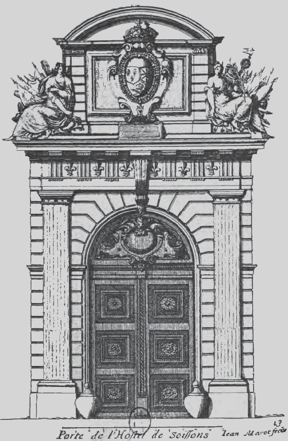 Portail monumental de l'Hôtel de Soissons, élevé par Salomon de Brosse en 1611.